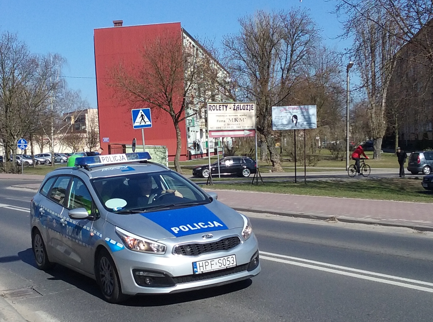 Radiowóz Kia Cee'd Policji w Tomaszowie Mazowieckim, w województwie łodzkim. PL,EU, CC0